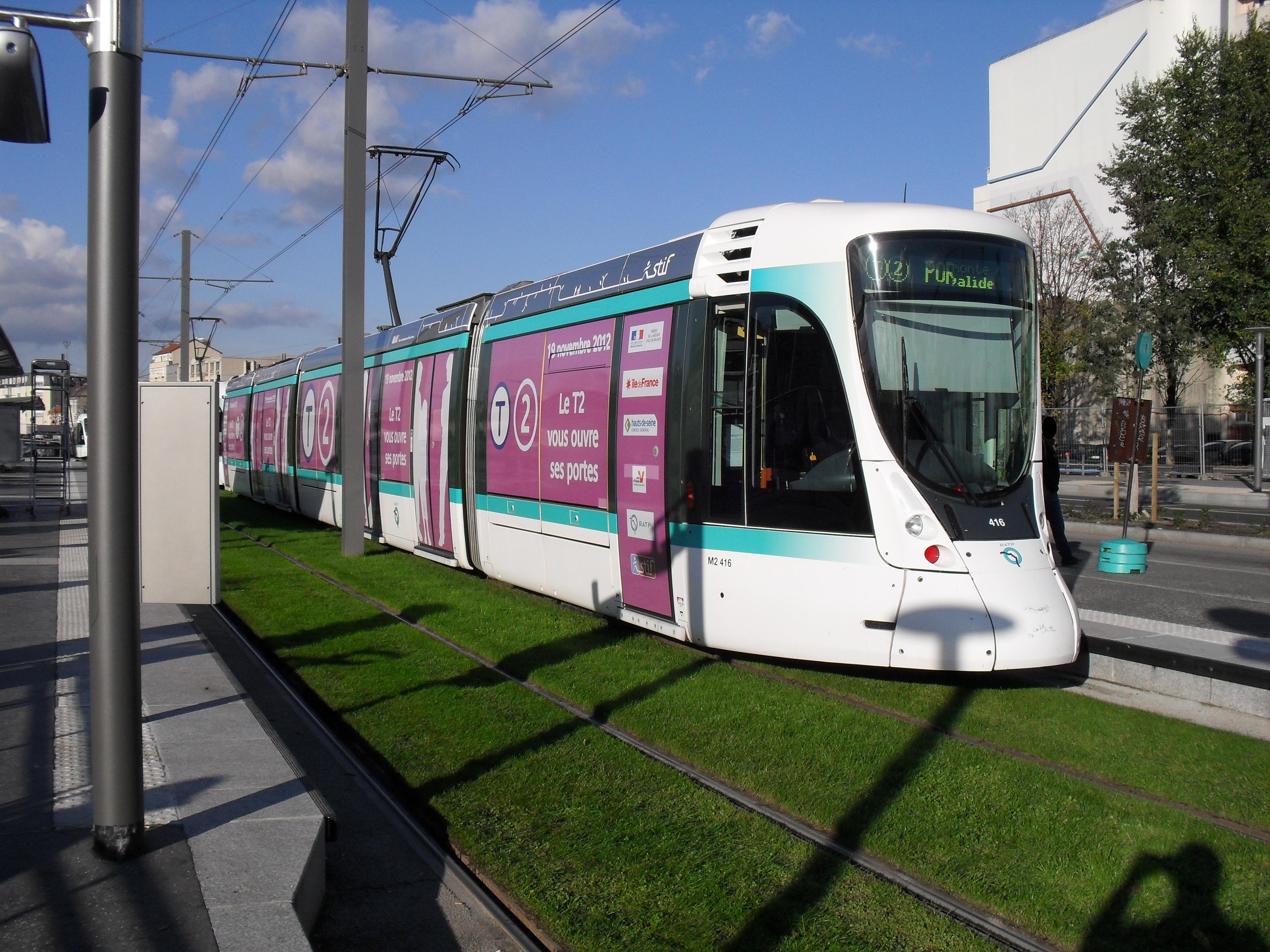 Paris Tramway ligne 2